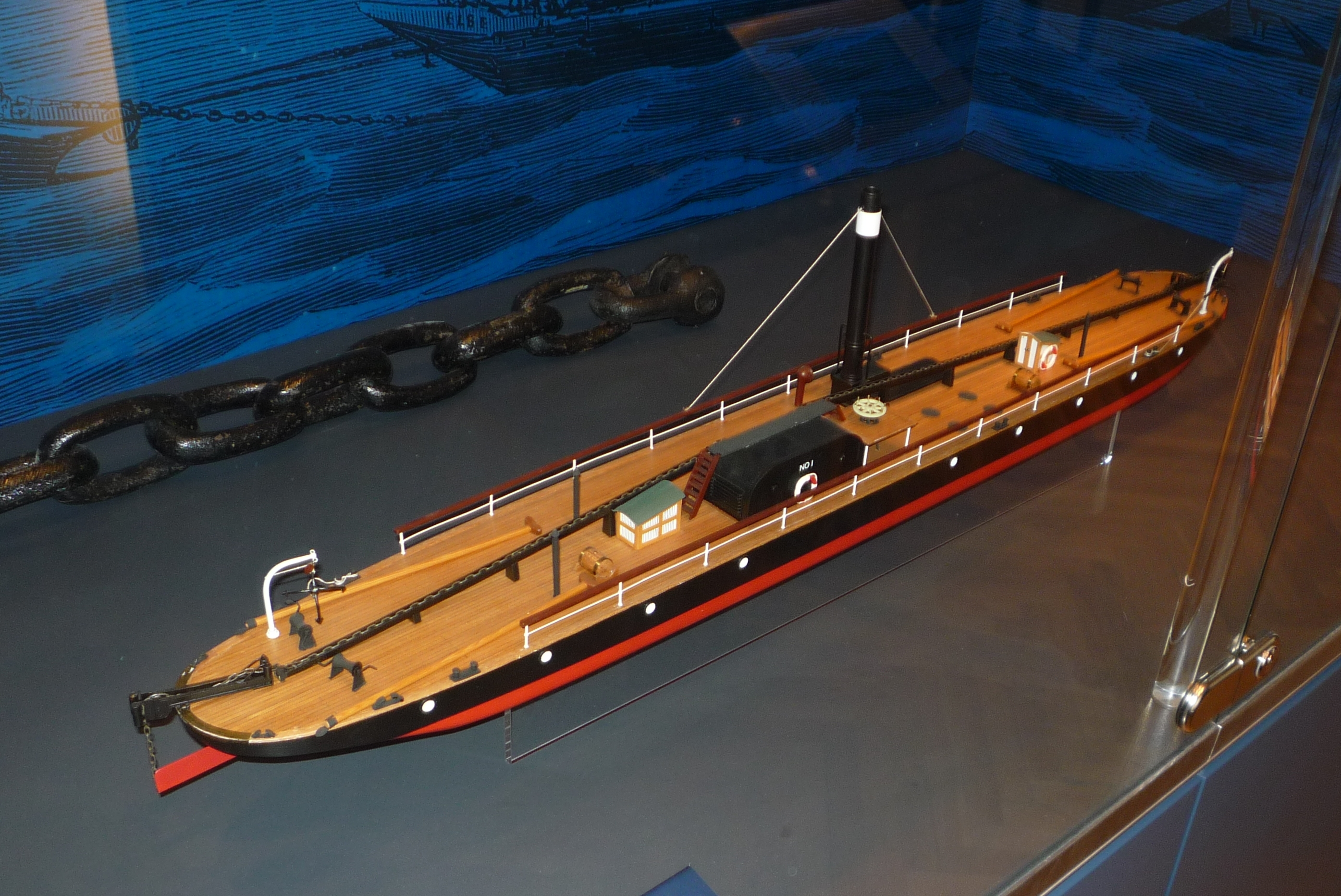 Modell des Kettendampfers No 1 (Maßstab 1:50) im Verkehrsmuseum Dresden.